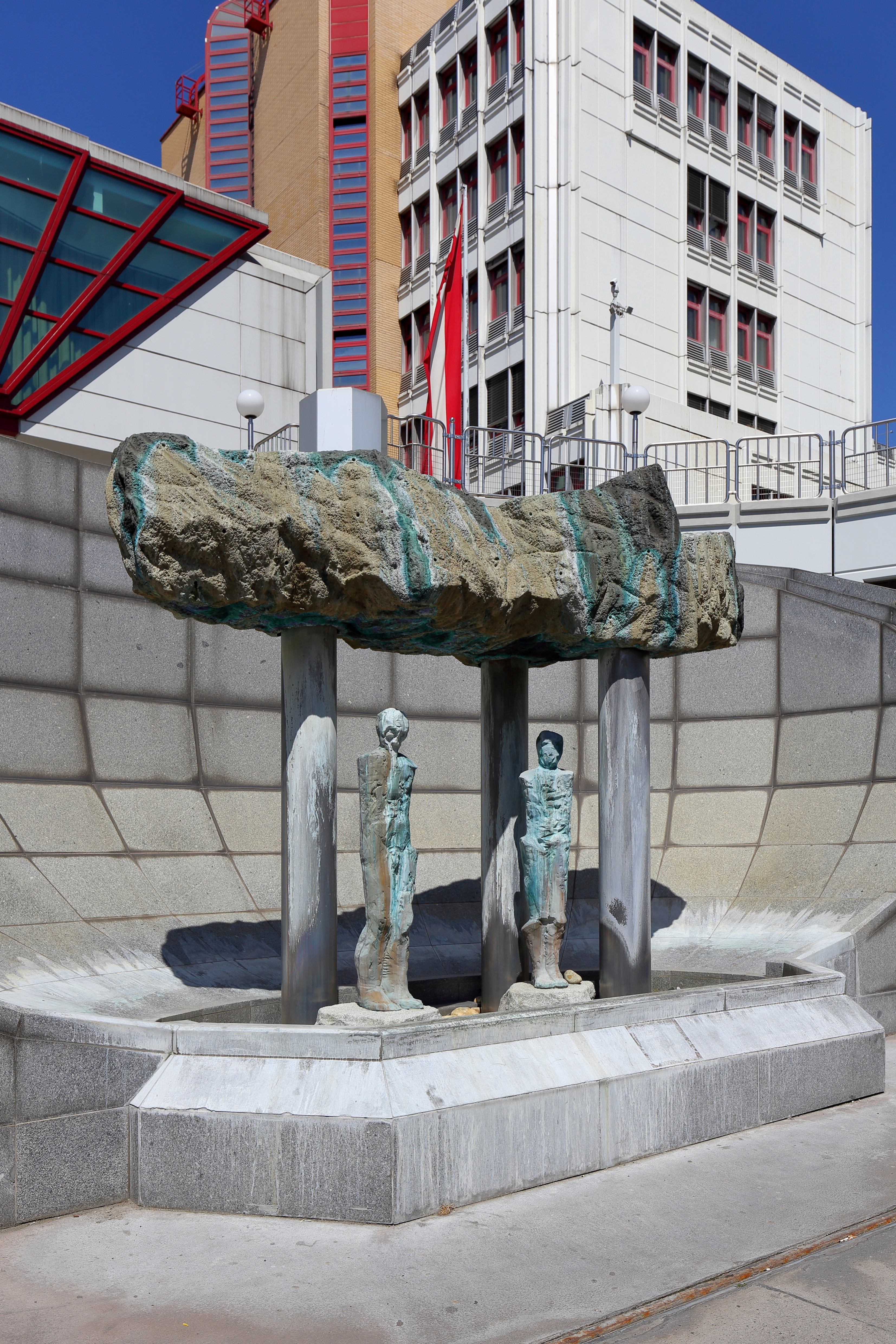 Der Frohner-Brunnen vor dem Bundesamtsgebäude am Josef-Holaubek-Platz im 9. Wiener Gemeindebezirk Alsergrund.Der Brunnen wurde von der Bundesimmobiliengesellschaft (BIG) gestiftete, 1989/90 errichtet und von dem Künstler und Bildhauer Adolf Frohner gestaltet. Künstlerische Beschreibung siehe bei Austria-Forum: [1].